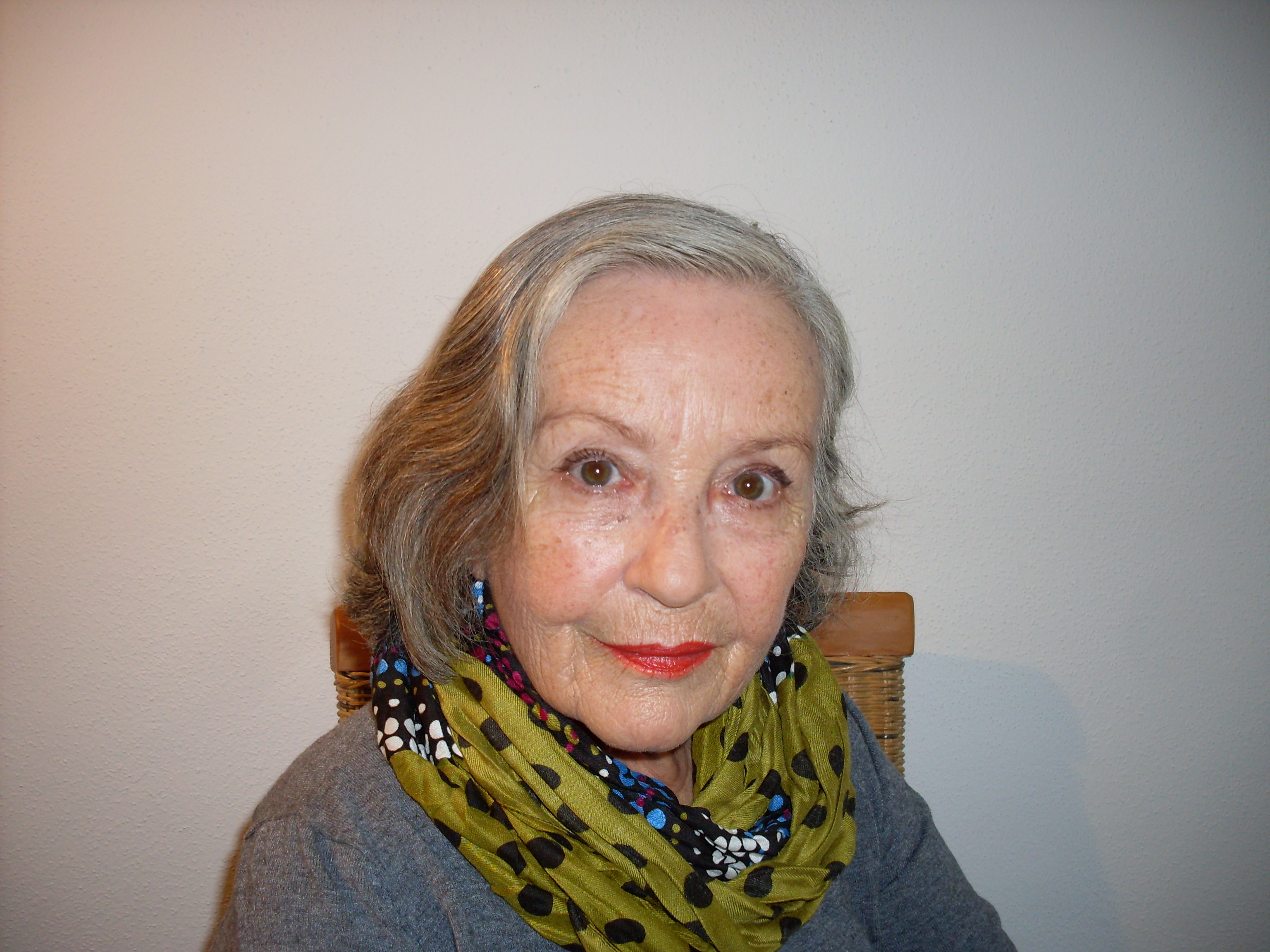 Dieses Privatfoto entstand im Jahre 2008